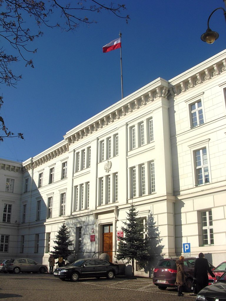 Budynek Kujawsko-Pomorskiego Urzędu Wojewódzkiego, Bydgoszcz Jagiellońska 3, 1834-36, Carl Adler, Friedrich Obuch, Karl Friedrich Schinkl. Rozbudowa 1863-64, 1898-1900 i 1965